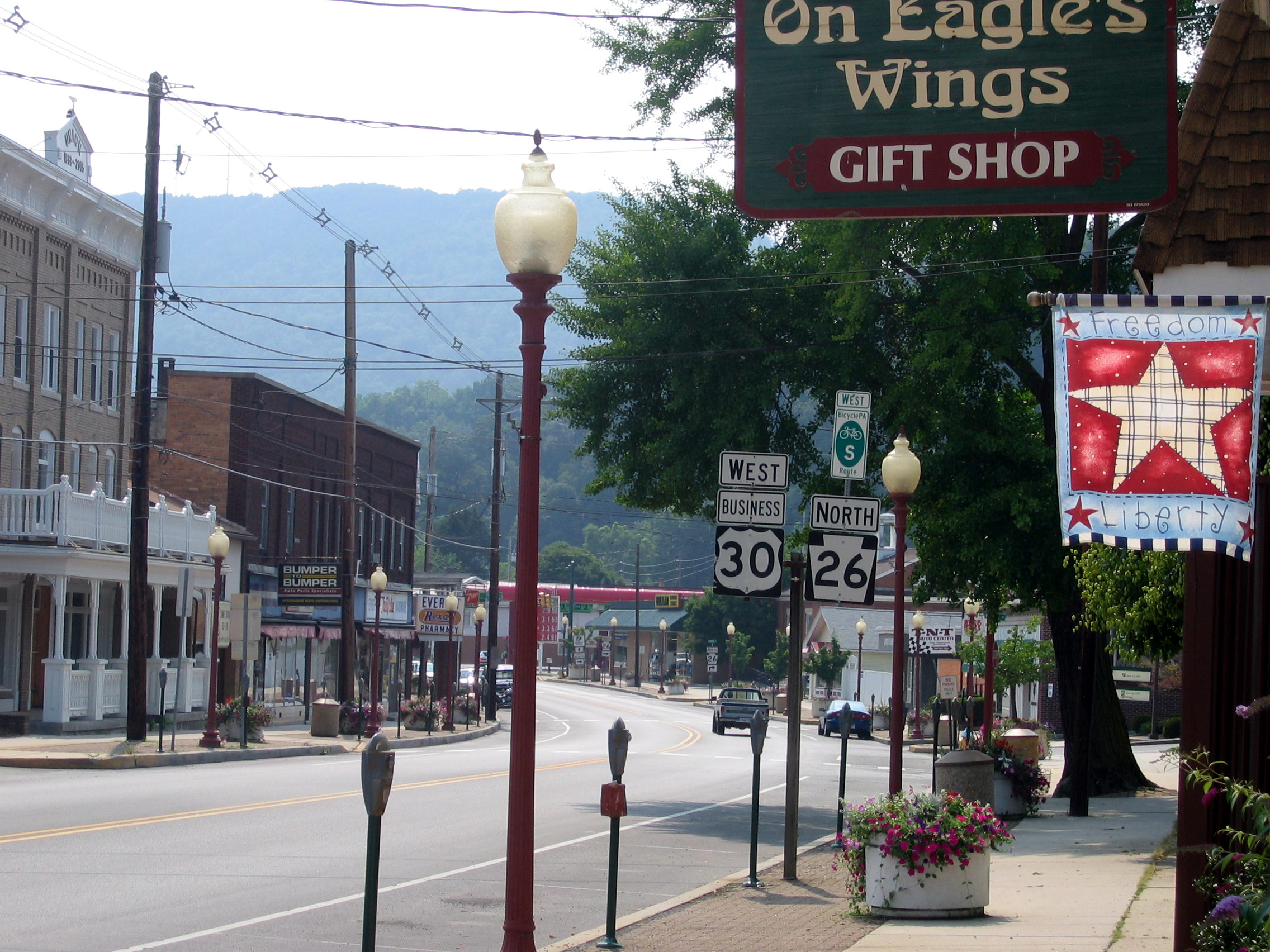 Main Street in Everett, Pennsylvania.